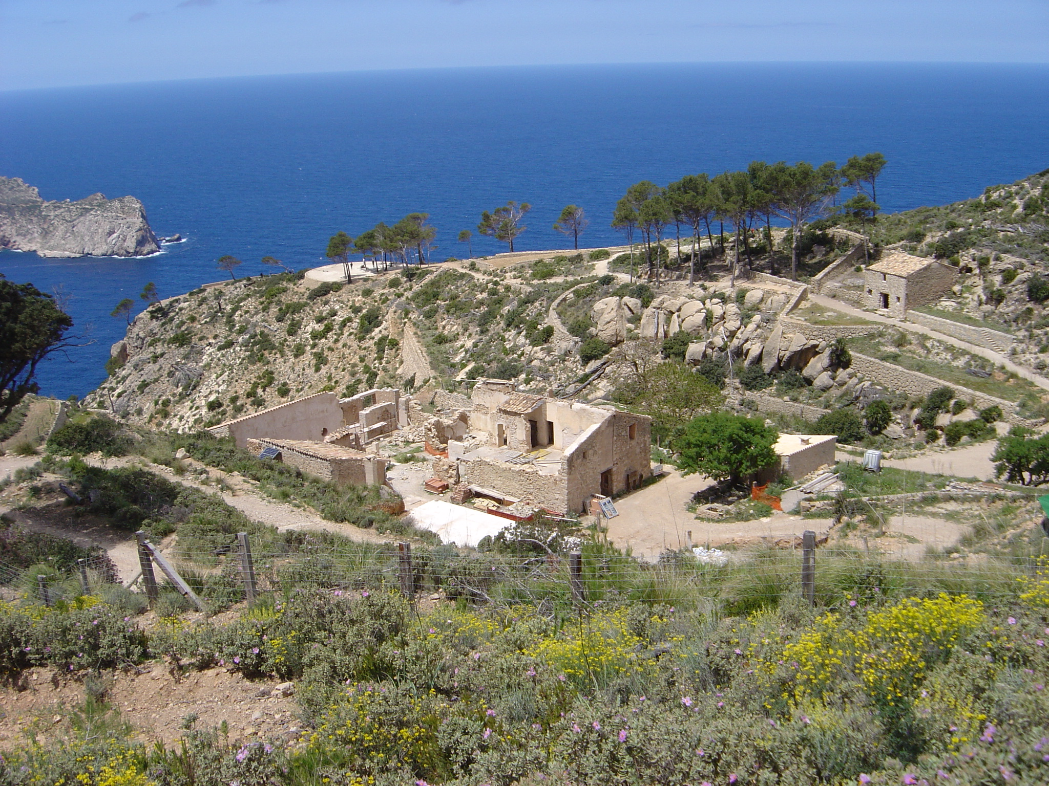 La Trapa. Andratx. Mallorca.